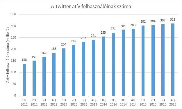 A Twitter atív felhasználóinak száma. Forrás: Felix Knoke, Rosta Gábor (2016-04-01). "Zuhanórepülésben a Twitter". CHIP Magazin: 9. MediaCity Magyarország Kft.. ISSN 0864-9421. Retrieved on 2016-04-16.